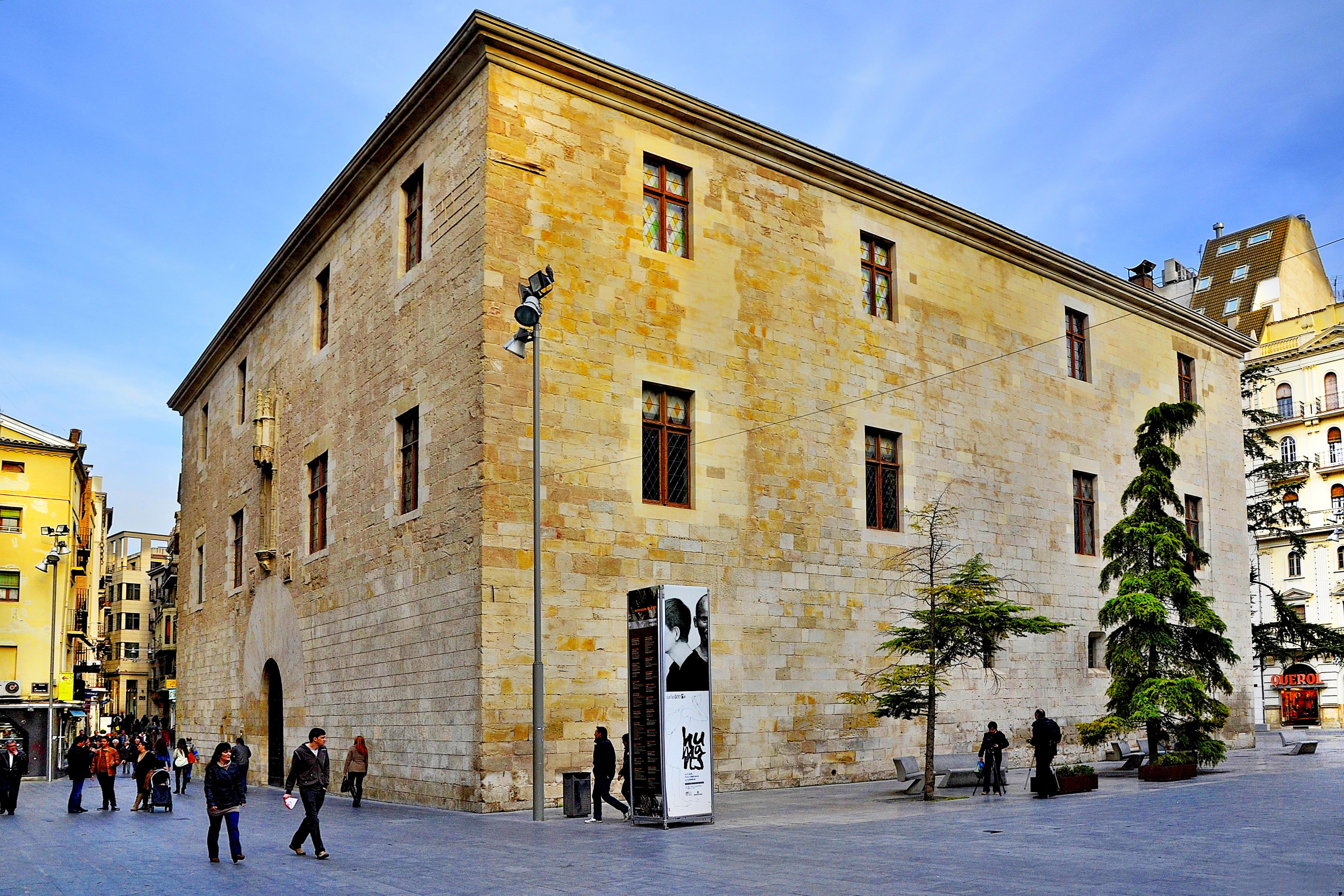 Sede del Instituto de Estdudios Ilerdenses (edificio de estilo gótico-plateresco del siglo XV-XVI) antiguo hospital de Santa María.